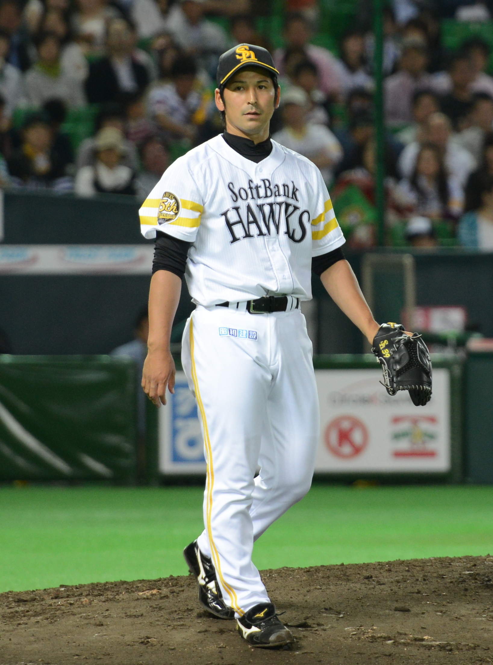 山中 浩史（やまなか ひろふみ）福岡ソフトバンクホークスに所属する野球選手（投手）。